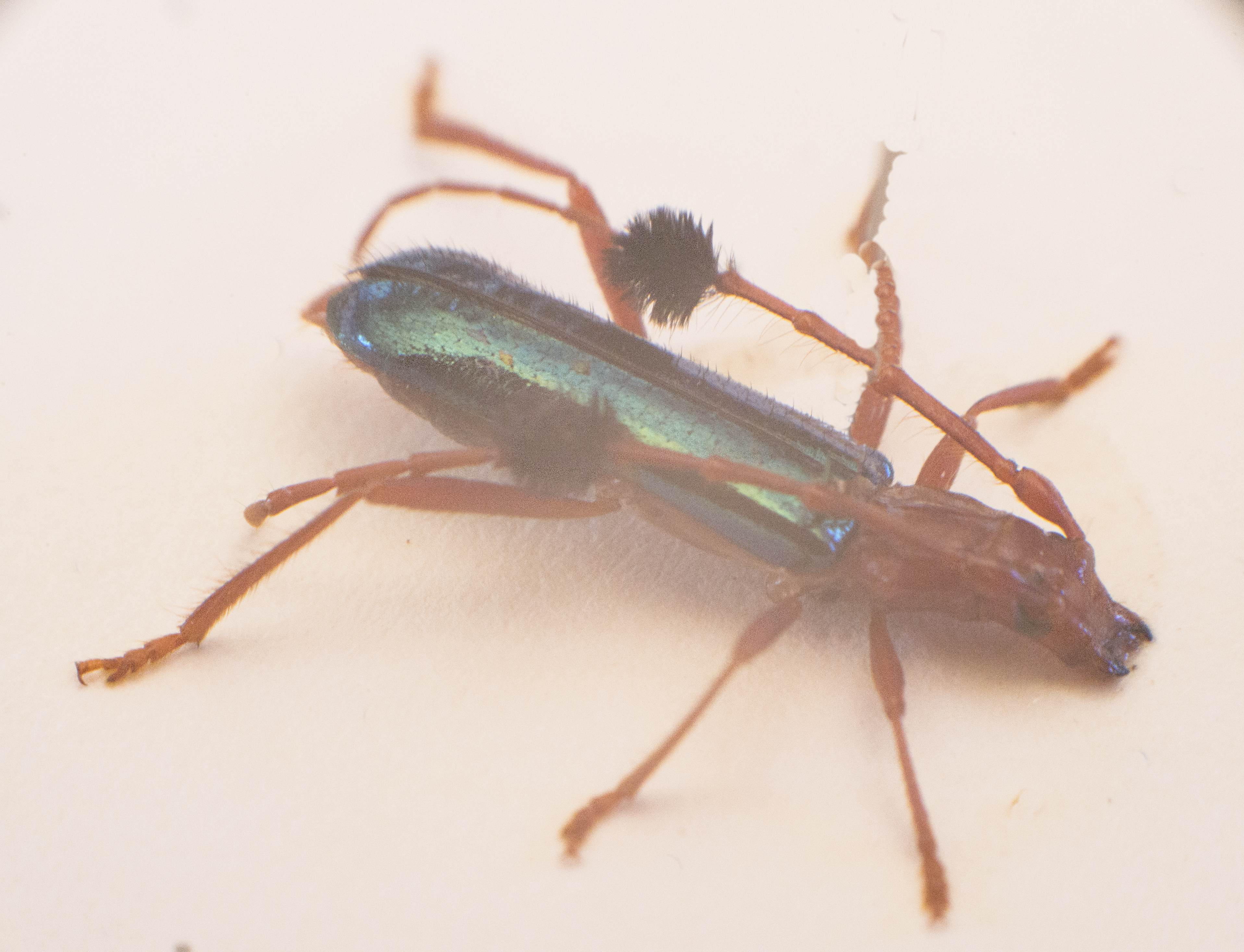 Nombre científico "Compsocerus violaceus".